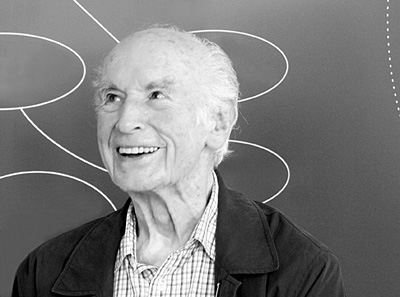 Albert Hofmann während eines Gesprächs "Über Schönheit" im Helmhaus Zürich. Albert Hofmann during a discussion "about beauty" at the Zürich Helmhaus.